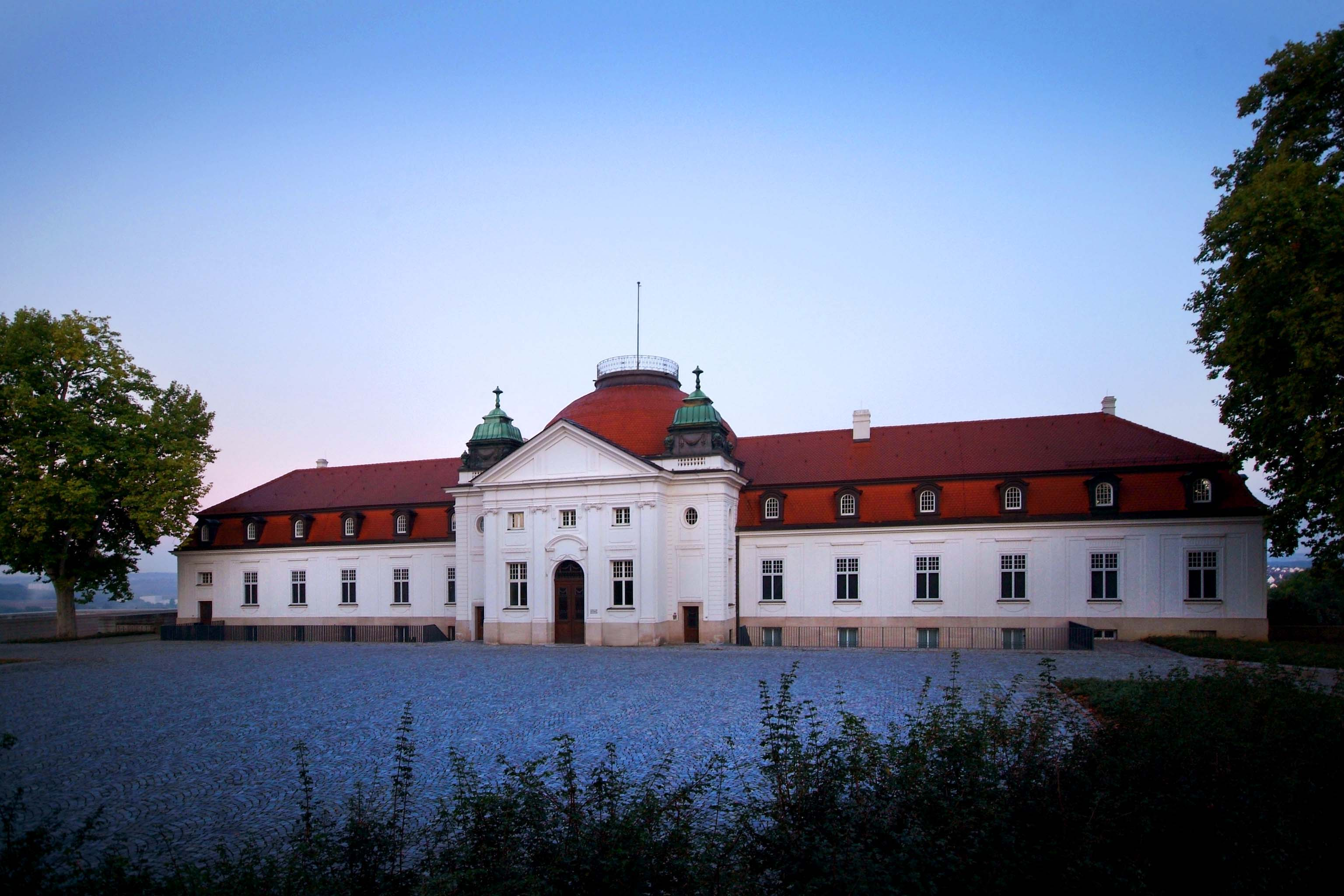 Das Schiller-Nationalmuseum in Marbach am Neckar.